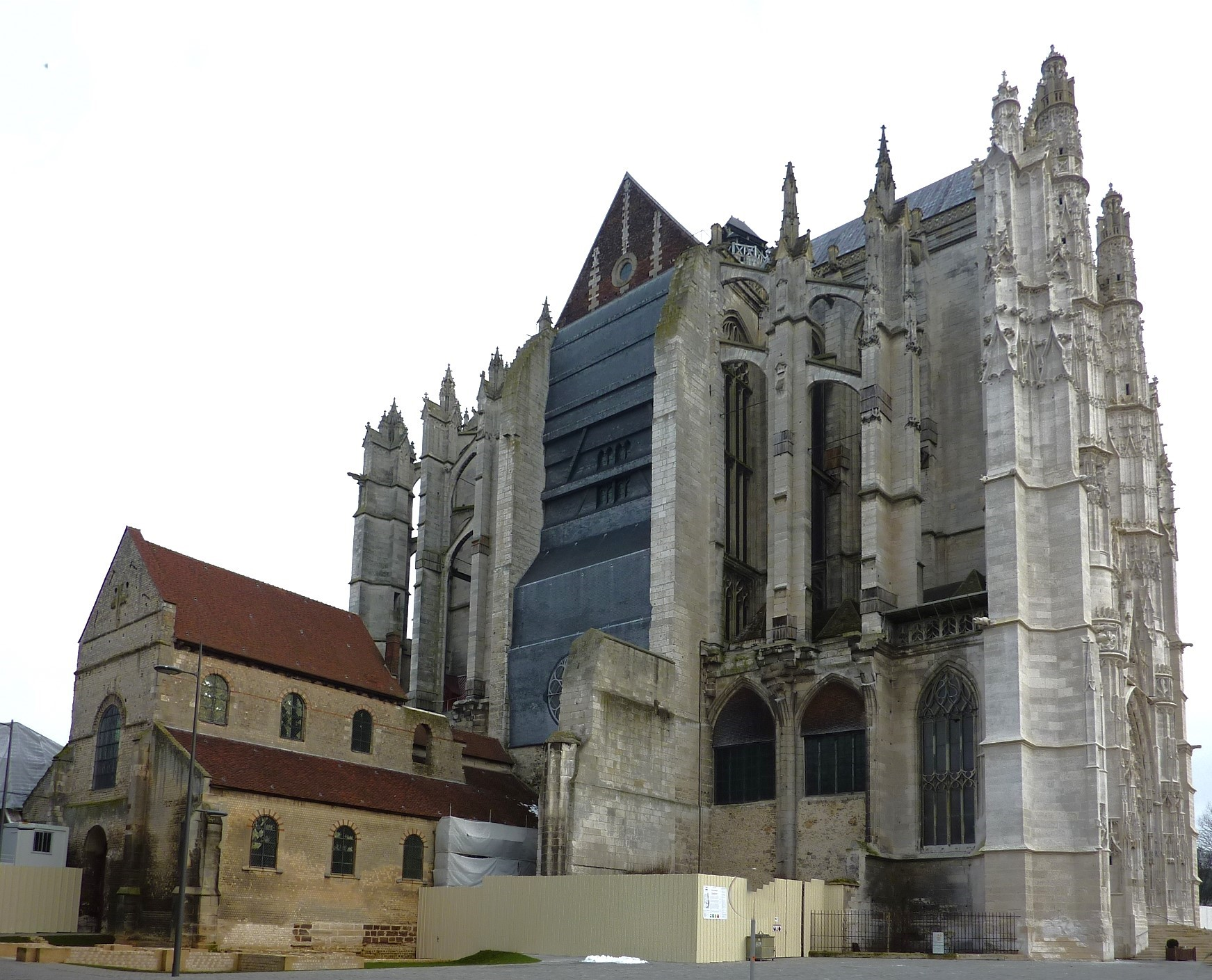 Cathédrale Saint-Pierre de Beauvais